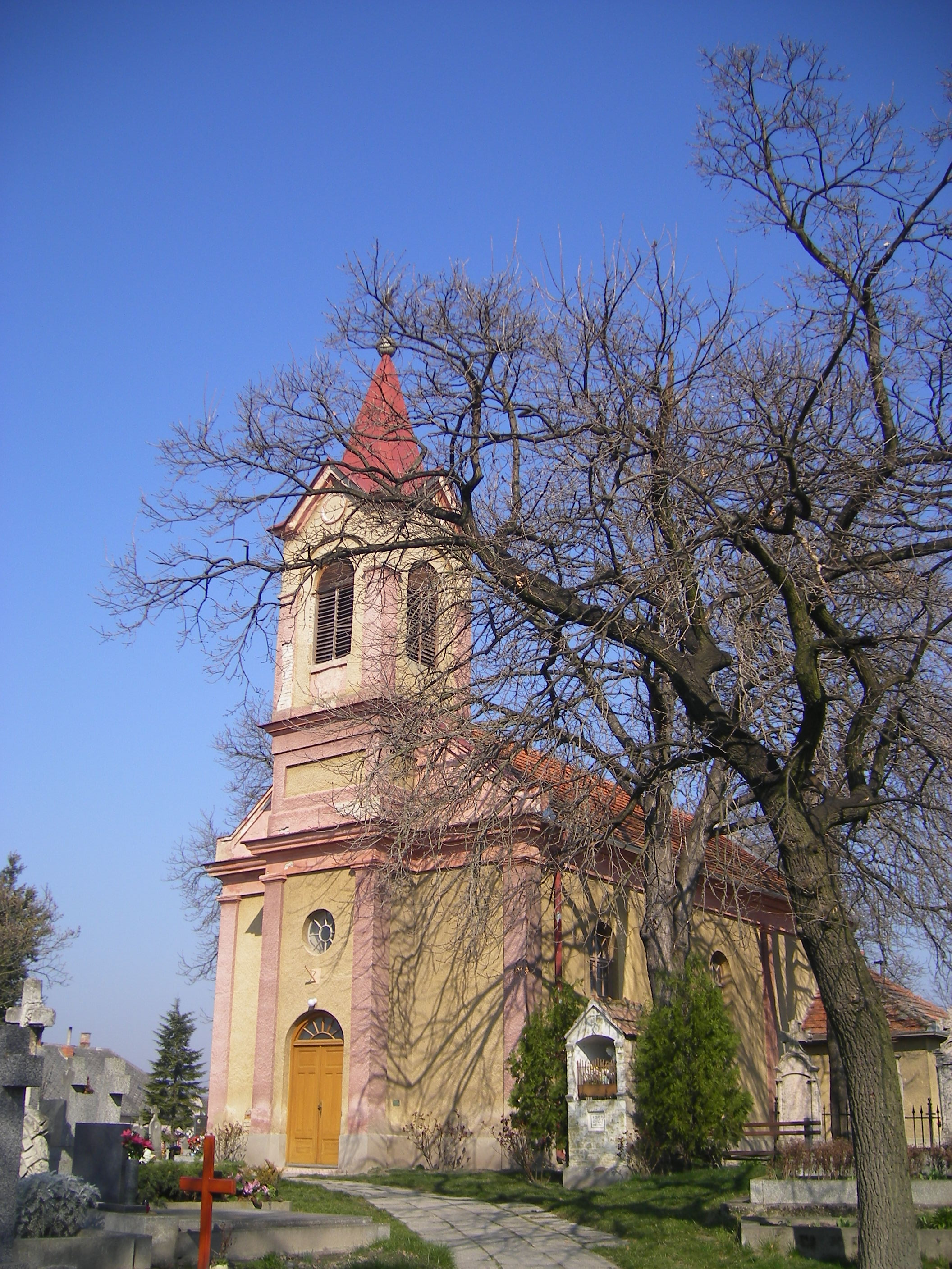 Kolozsnéma, katolikus templom (1884)